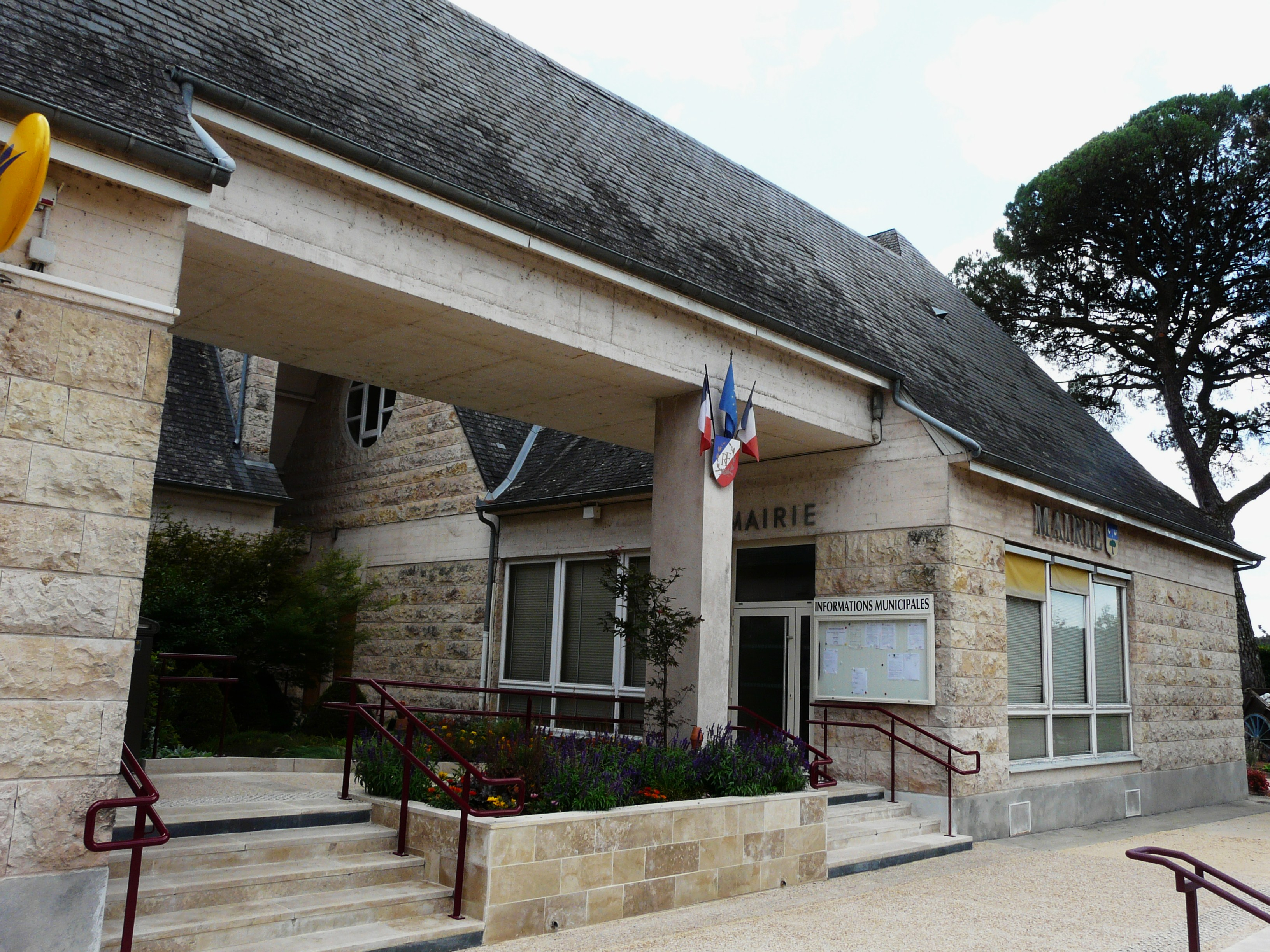 La mairie de Cublac, Corrèze, France